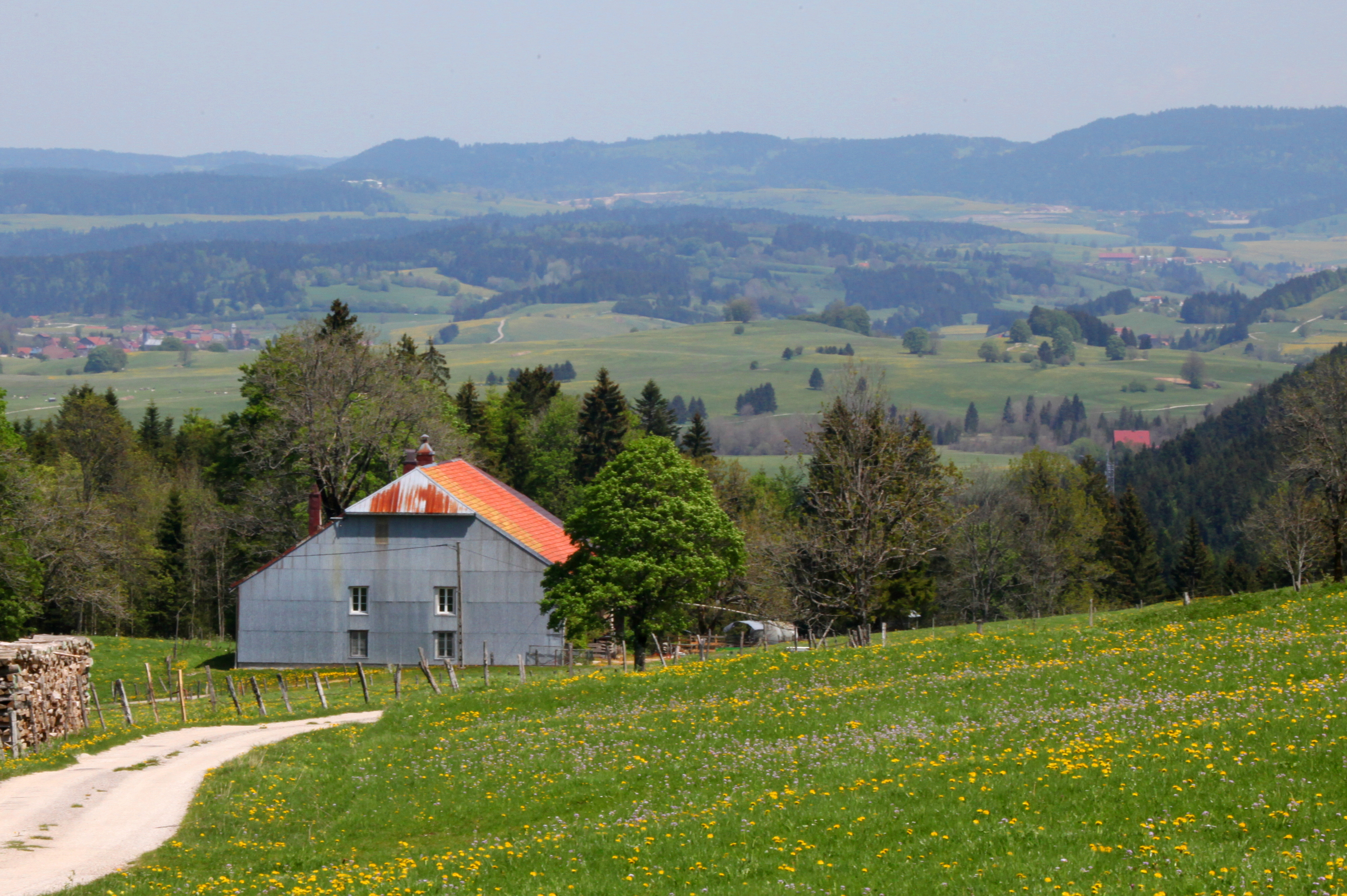 Une maison jurassienne dans la combe de Champvents. Au fond, le val de Mouthe et le mont de l'Herba.